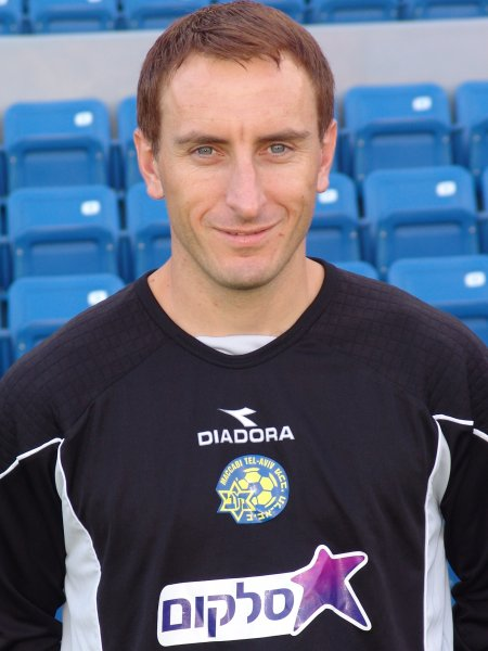 דרגוסלאב יבריץ', שחקן מכבי תל אביב (Dargoslav Yavrich of Maccabi Tel Aviv)